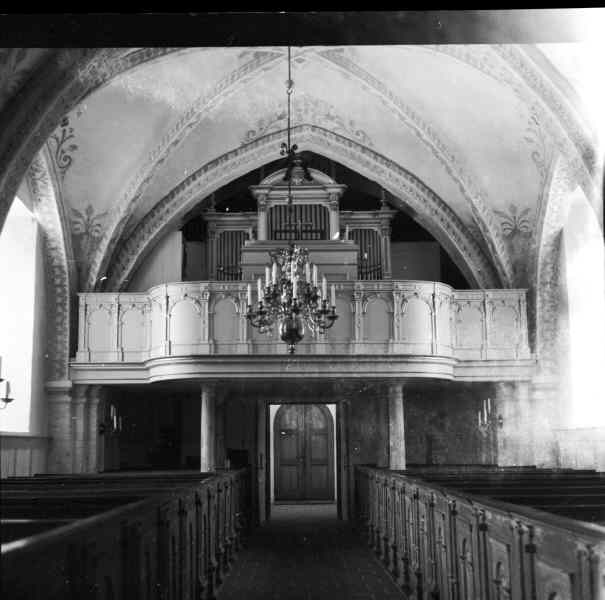 Interiör mot väster. Kategori: (02) InteriörerInteriör mot väster.